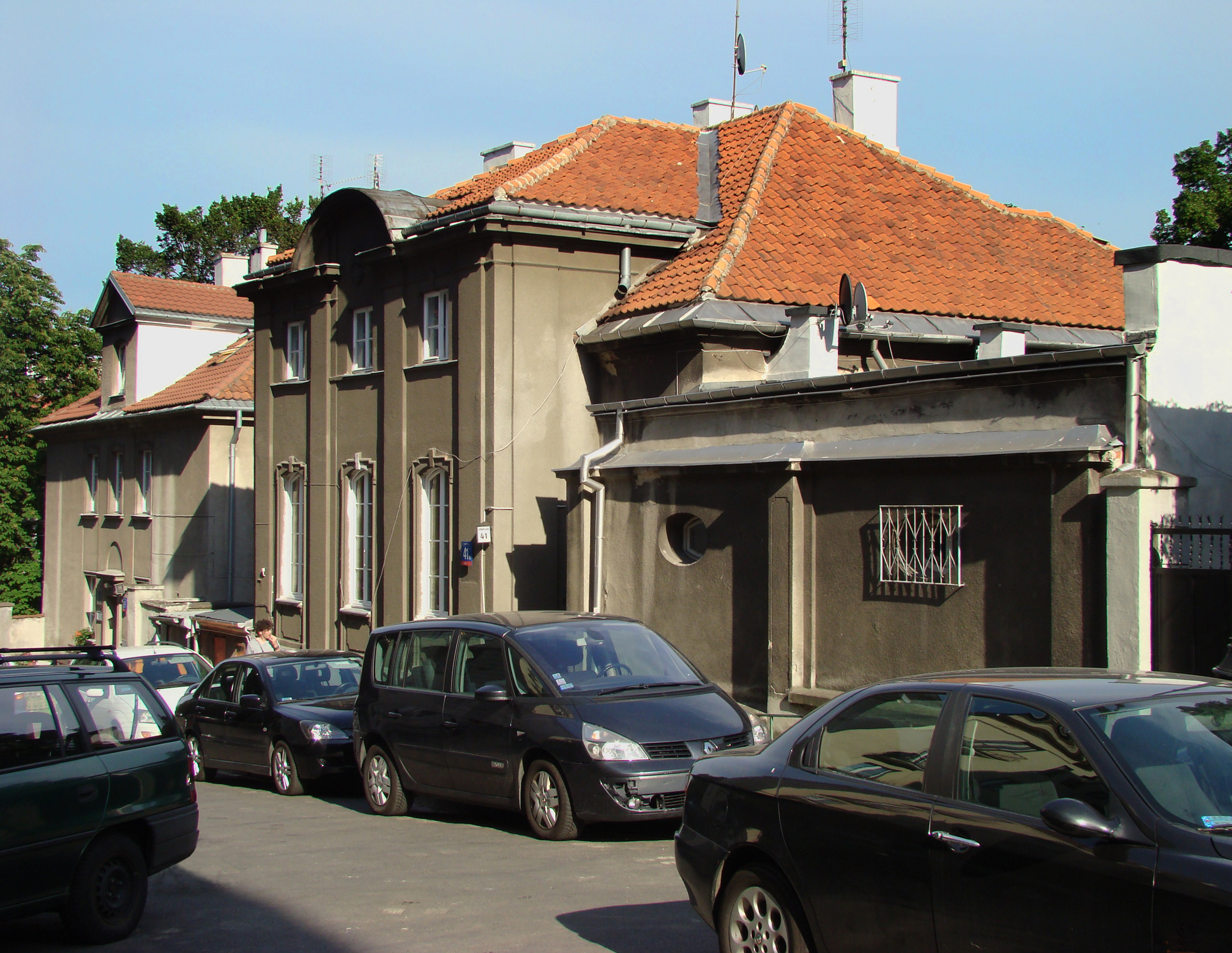 Willa własna prof. Mariana Lalewicza, Warszawa, ul. Górnośląska 41